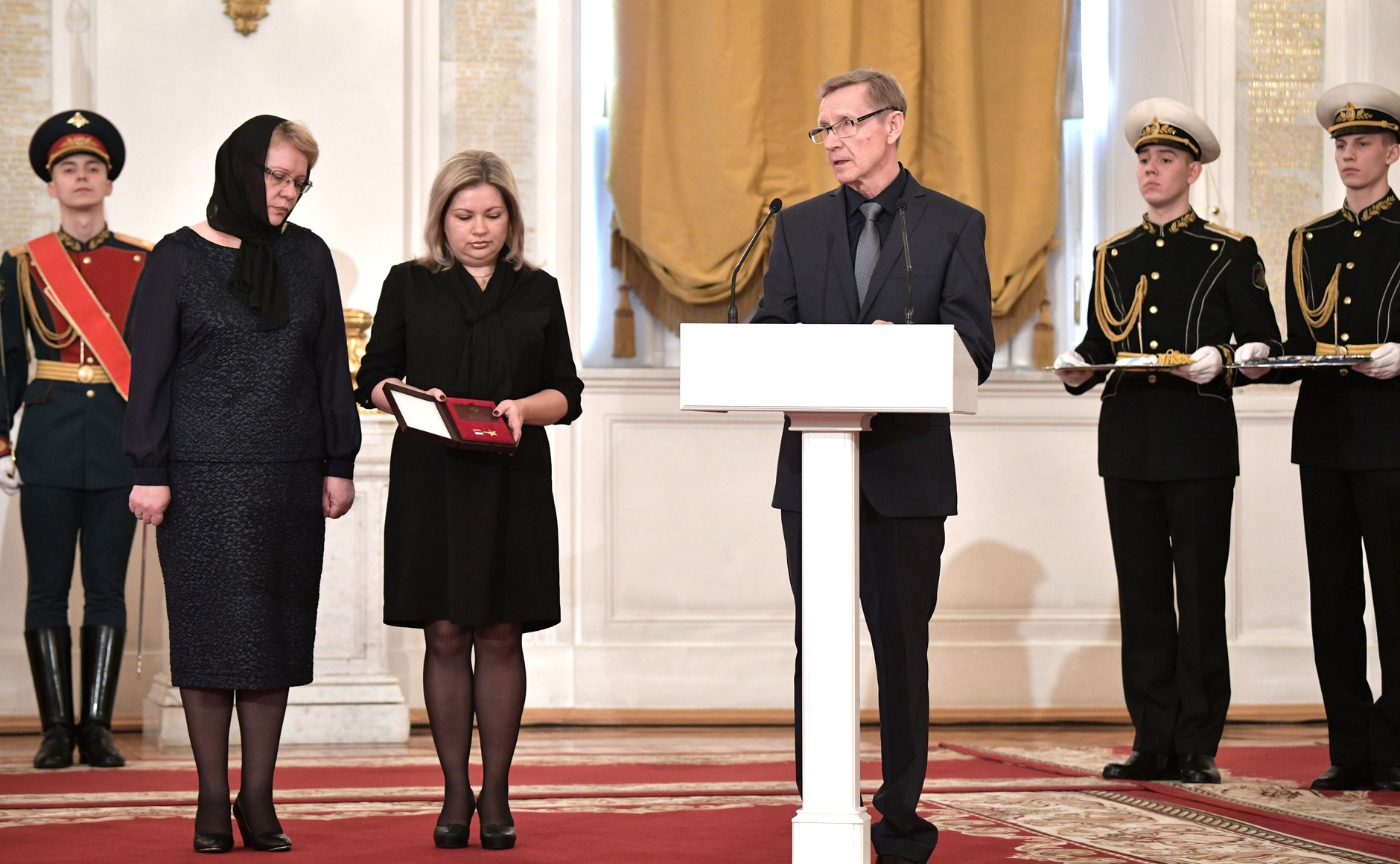 Церемония вручения государственных наград Российской Федерации, приуроченная к празднованию Дня защитника Отечества. Родственники погибшего в Сирии военного лётчика гвардии майора Романа Филипова